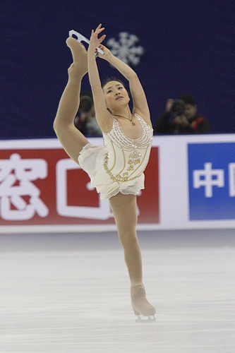 Гэн Бинва на Кубке Китая 2011